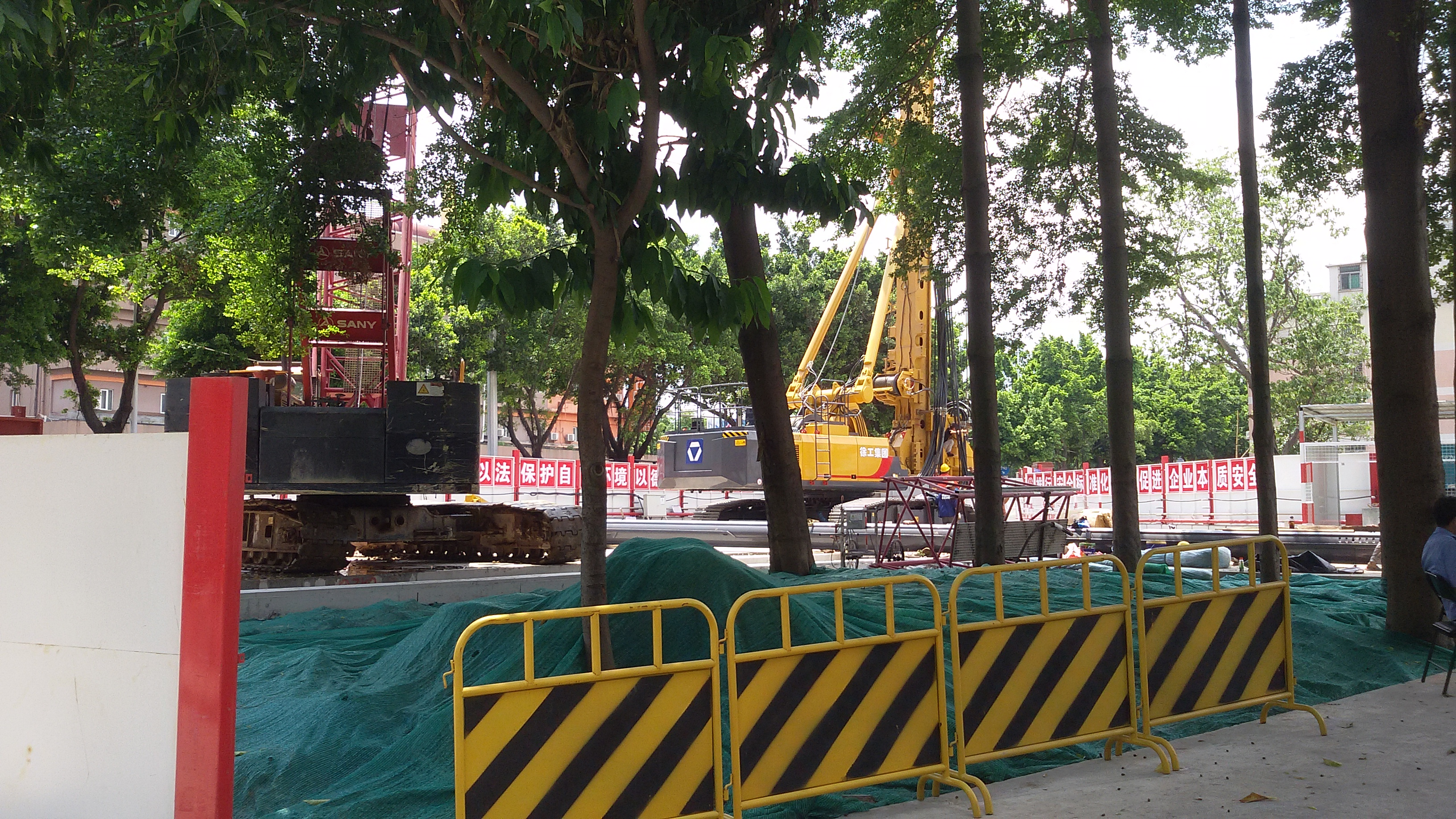 粵語: 廣州地鐵11號綫嘅工地（芳村站）